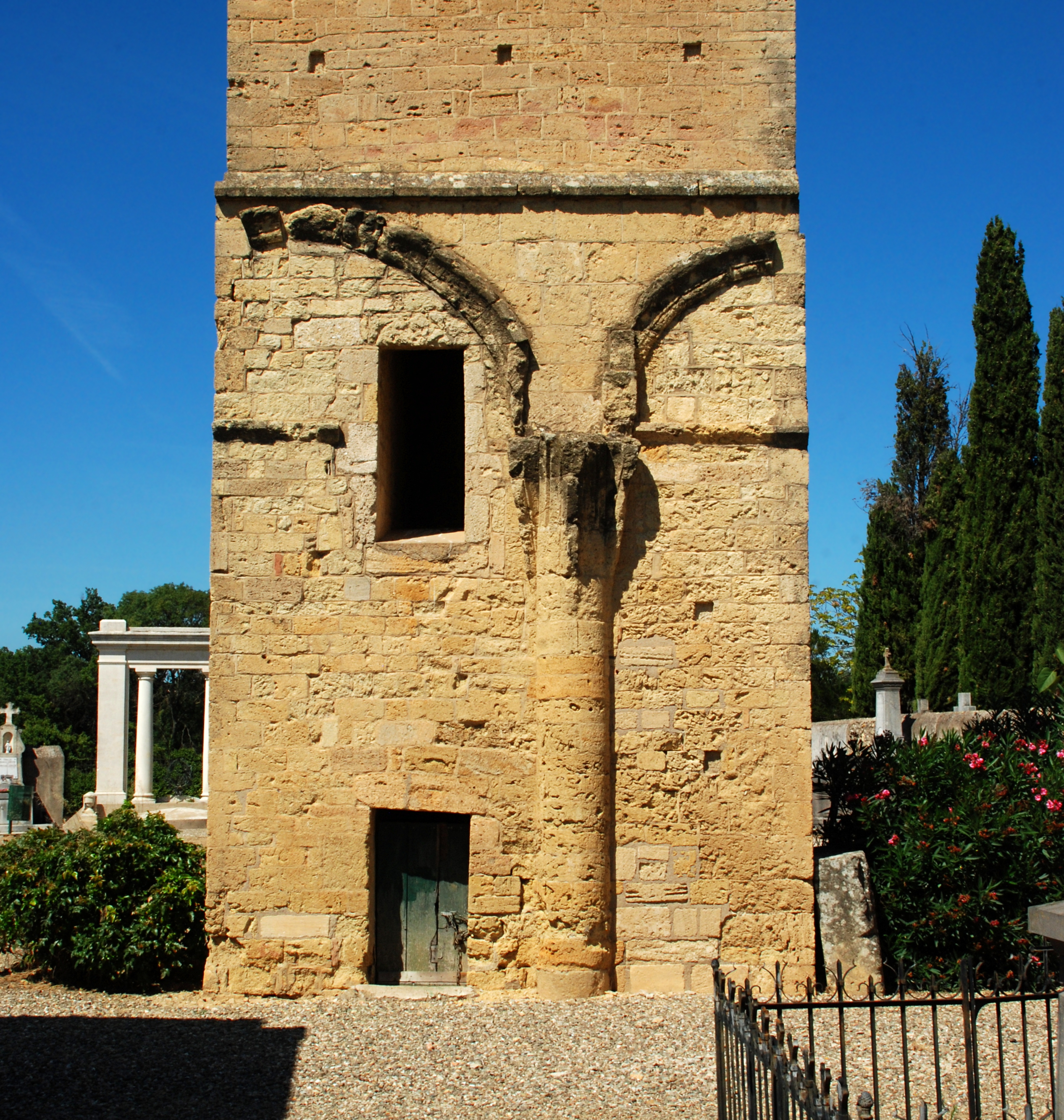 France - Languedoc - Hérault - Puissalicon - ancienne église Saint-Étienne-de-Pézan - tour romane .